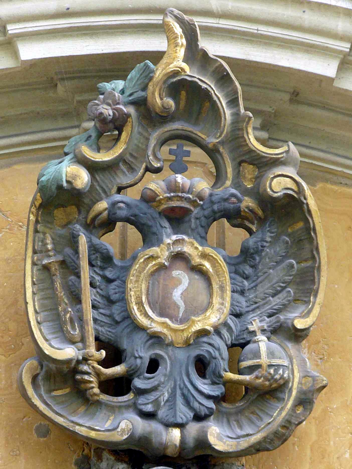 Aalener Stadtwappen von 1766, zu sehen an der Stadtkirche